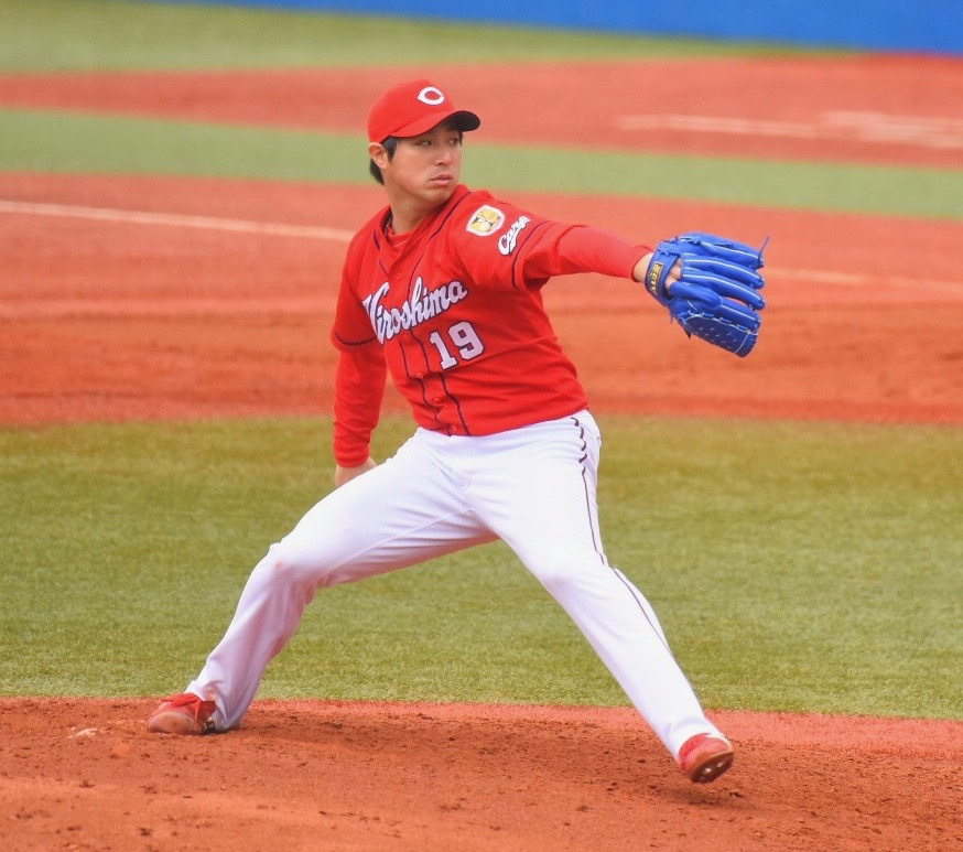 広島東洋カープ 野村祐輔 2018年3月16日 神宮球場